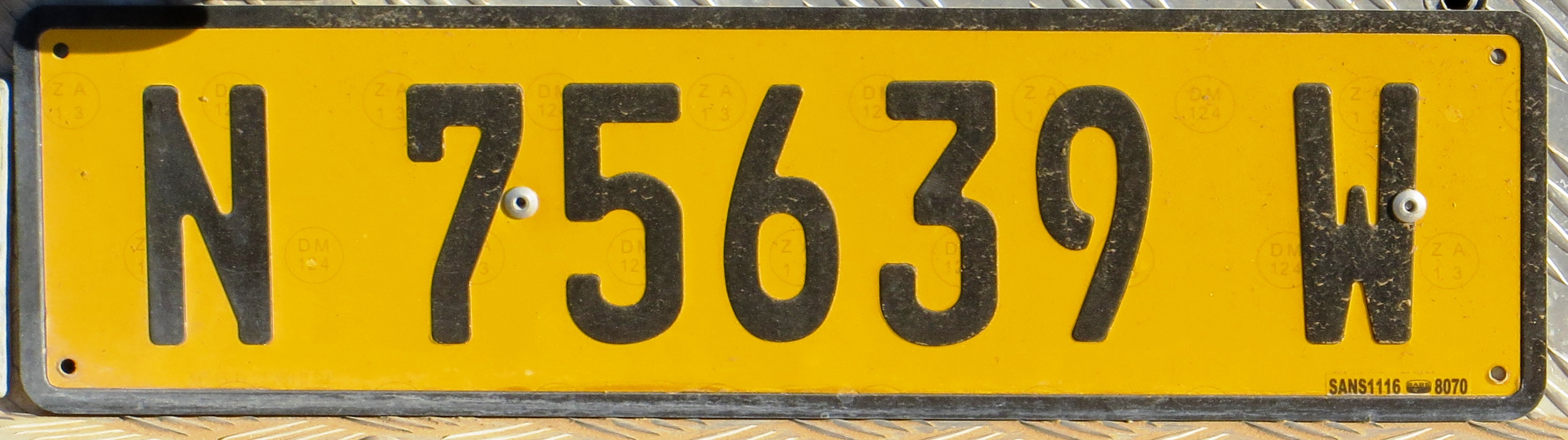 Namibië kentekenplaat